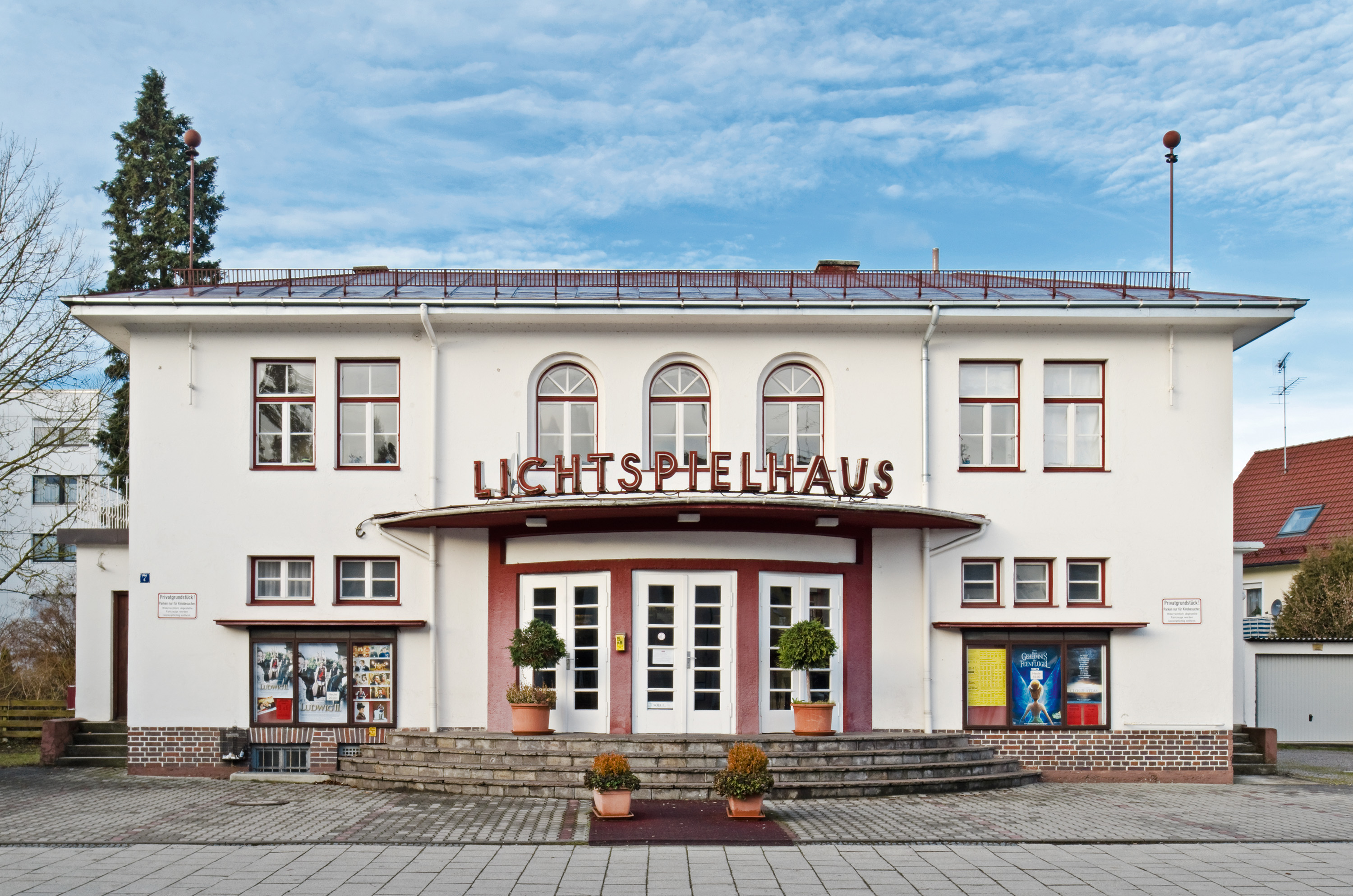 Kino „Lichtspielhaus“ in Fürstenfeldbruck, Bayern; erbaut 1930 nach Entwurf des Architekten Adolf Voll; seit 2014 unter Denkmalschutz; bis 2018 restauriertThis is a photograph of an architectural monument.